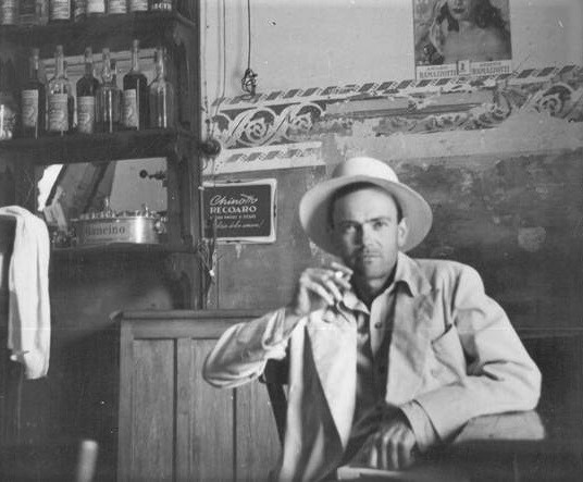 Aldo Buzzi, durante le riprese del film "Il mulino del Po" di Alberto Lattuada